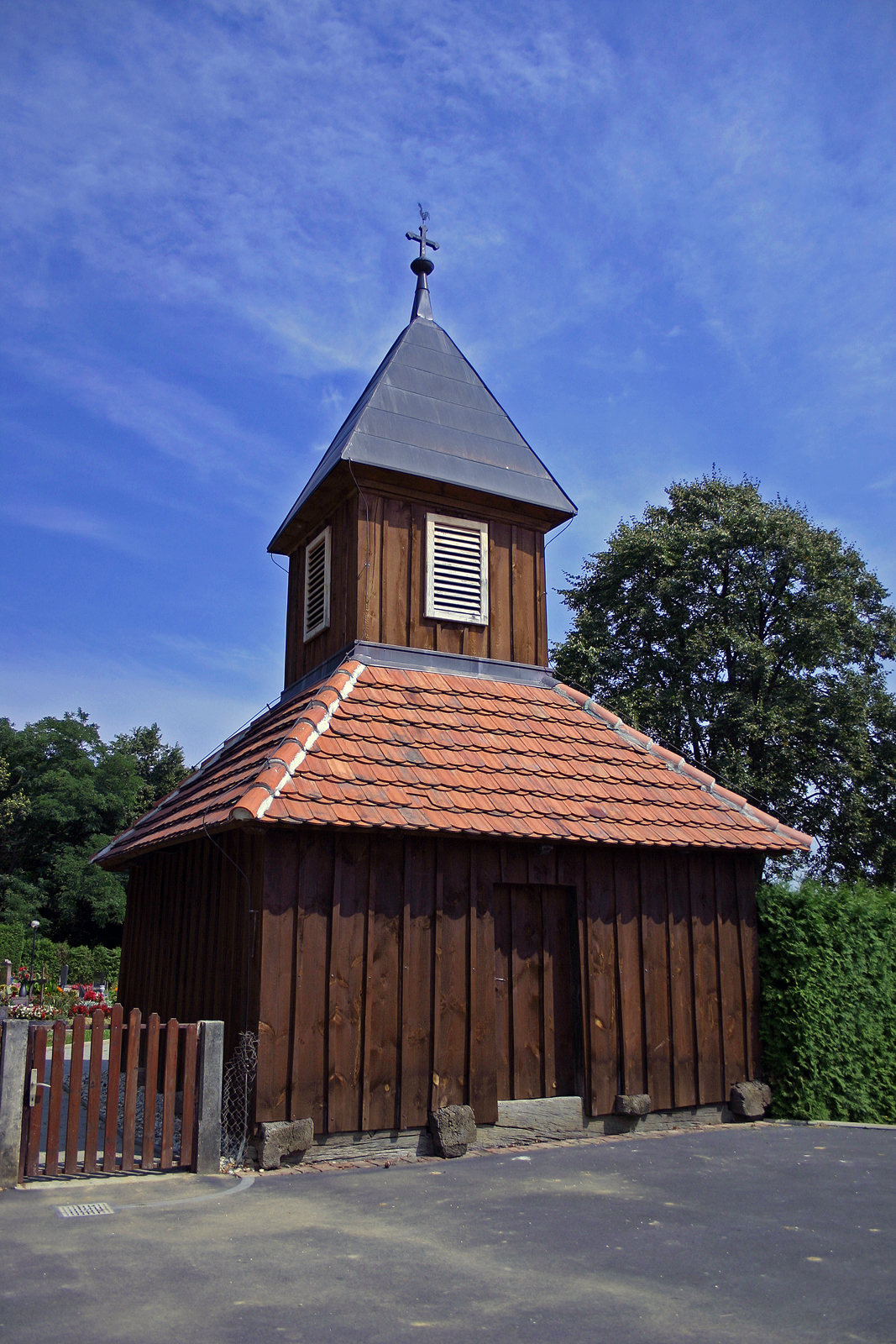 Leseni vaški zvonik, Dolina. Wood village campanile, Dolina. Dörflicher Holzglockenturm,Dolina.